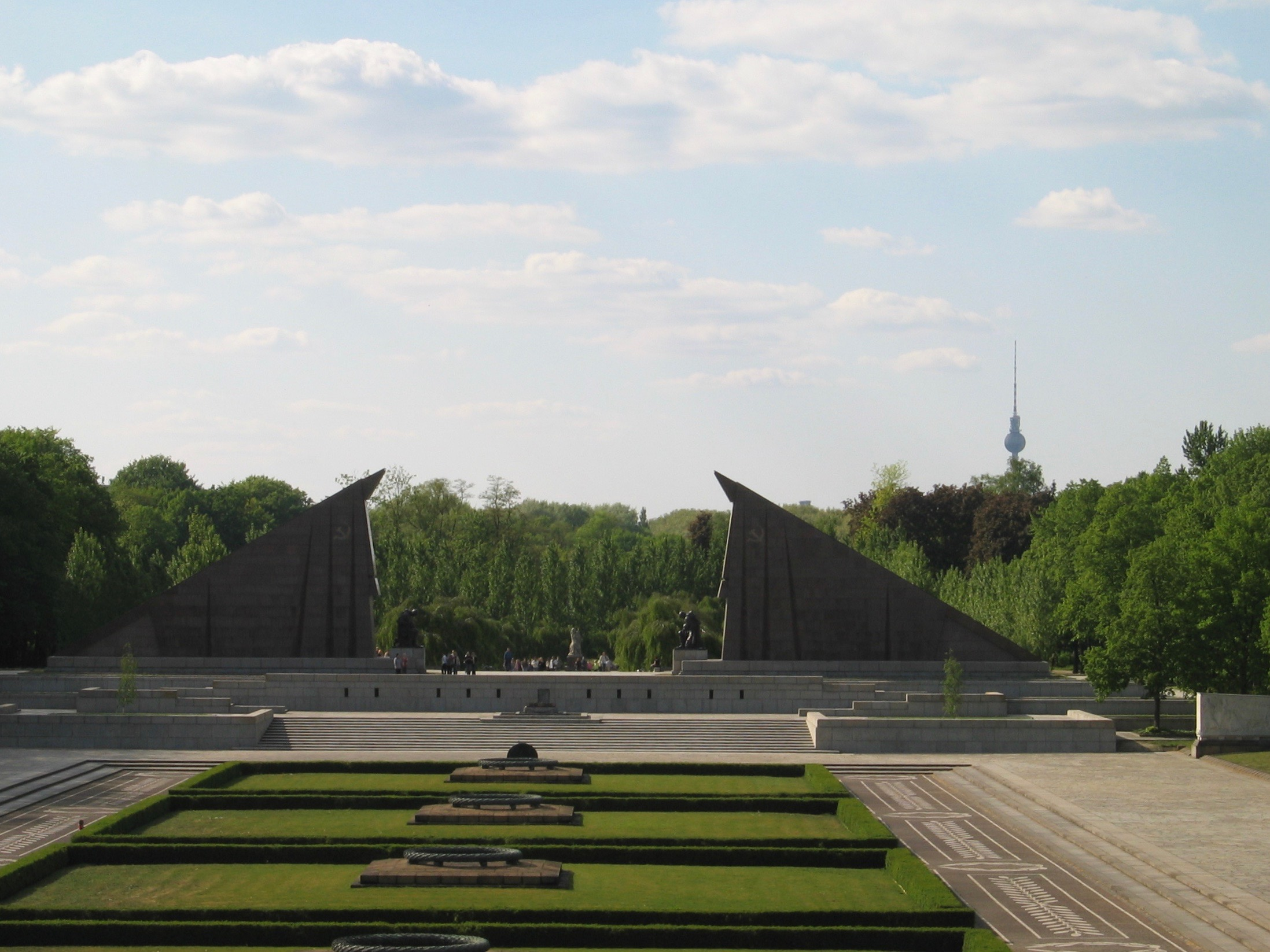 Berlin Treptow Sowjetisches Ehrenmal In Richtung Westen